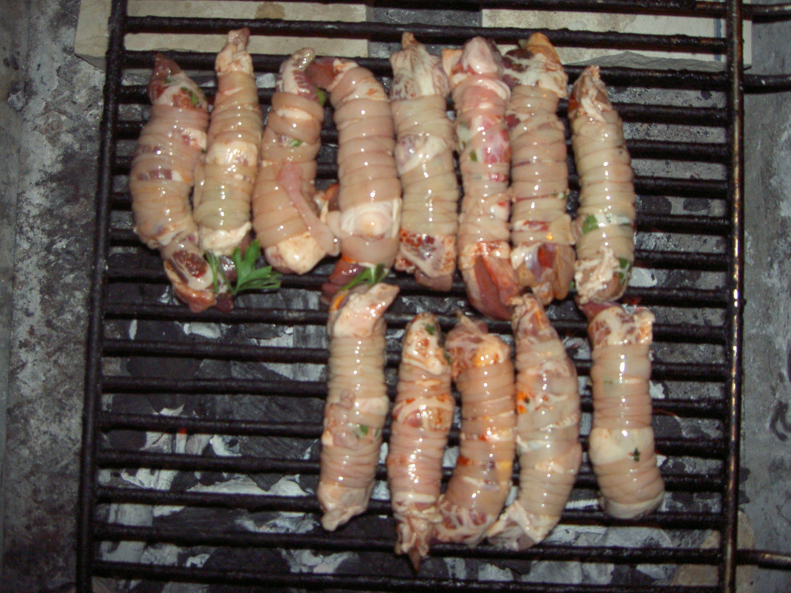 torcinelli